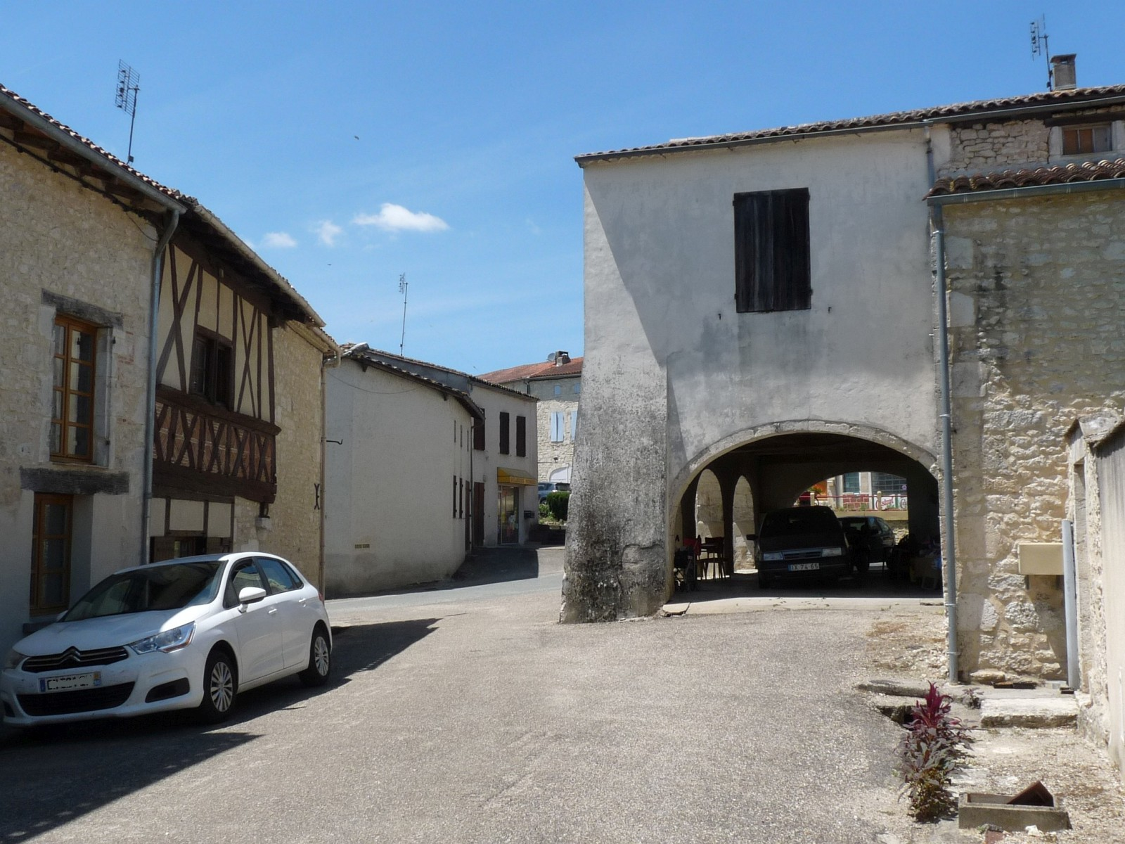 Arcades, Villeneuve-de-Duras, Lot-et-Garonne, France